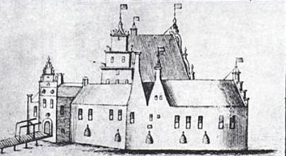 Fraam, verdwenen borg nabij Huizinge